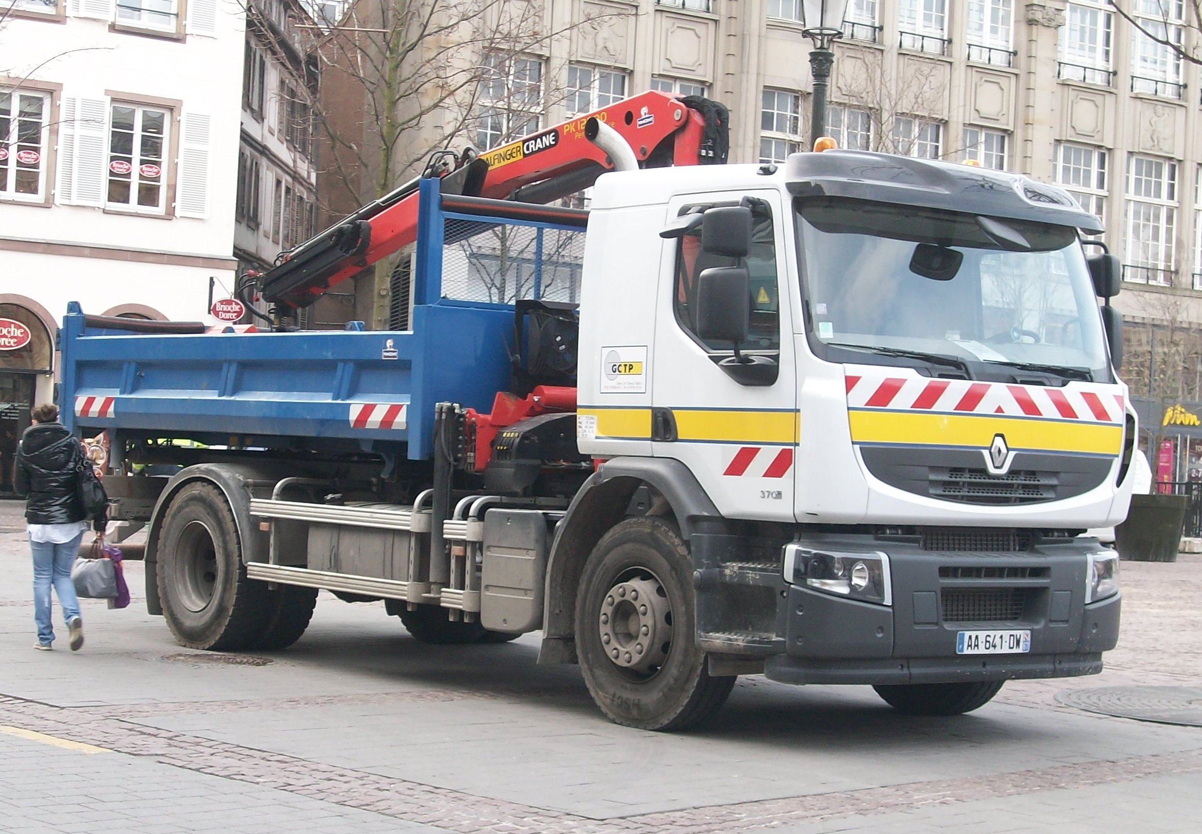 Renault de l'entreprise GCTP près de la place Kléber